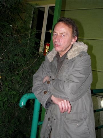 Michel Houellebecq (b. 1958), French writer